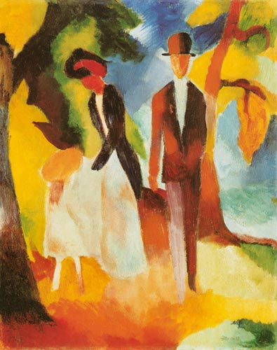 Das Bild Leute am Blauen See gemalt von August Macke 1913